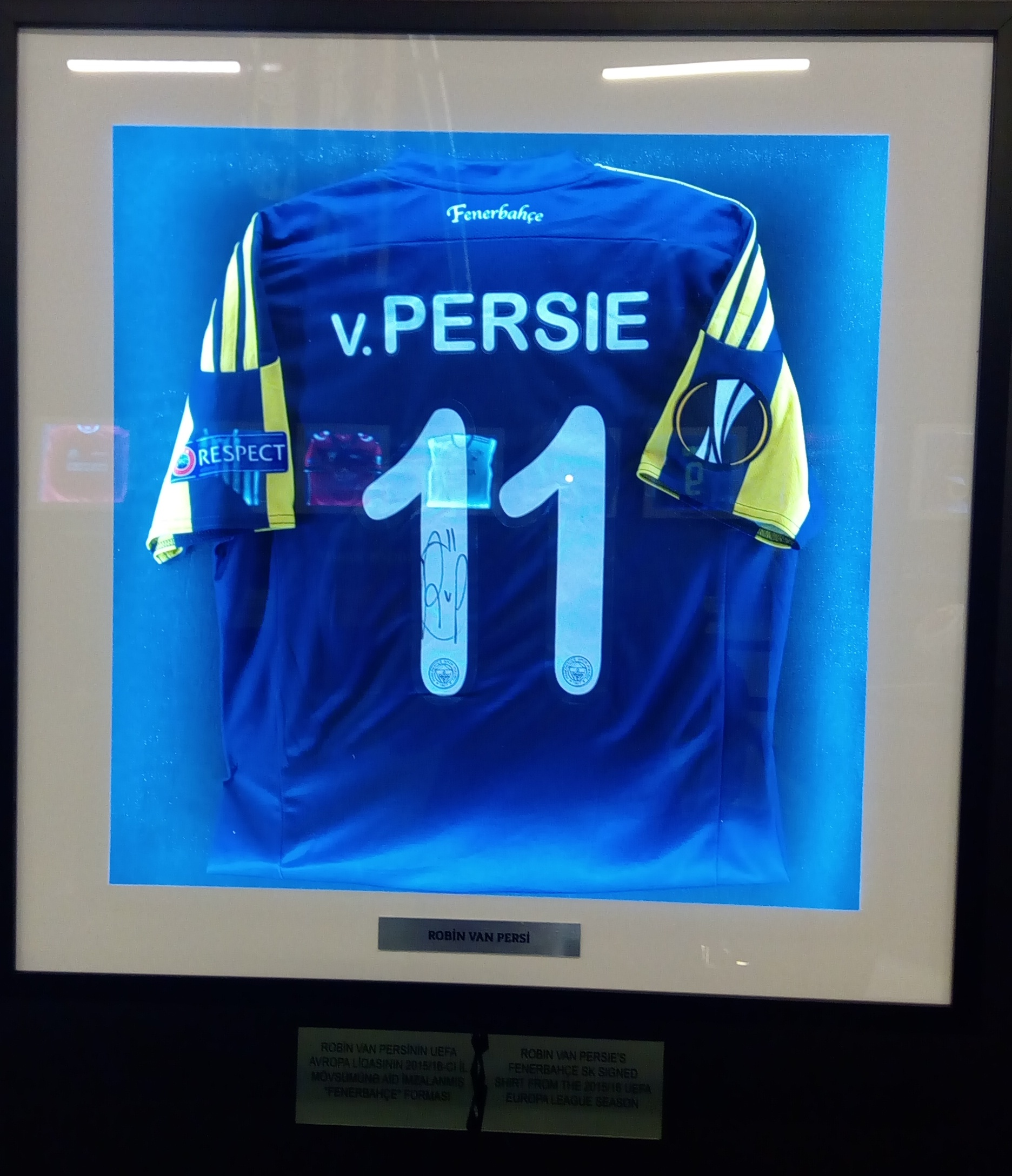 Avropa Liqası Muzeyi Bakıda